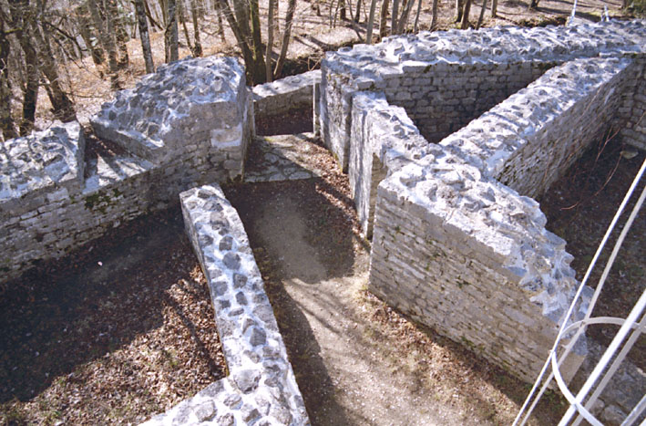 Toranlage und Zwinger der Burg Bischofstein, Sissach